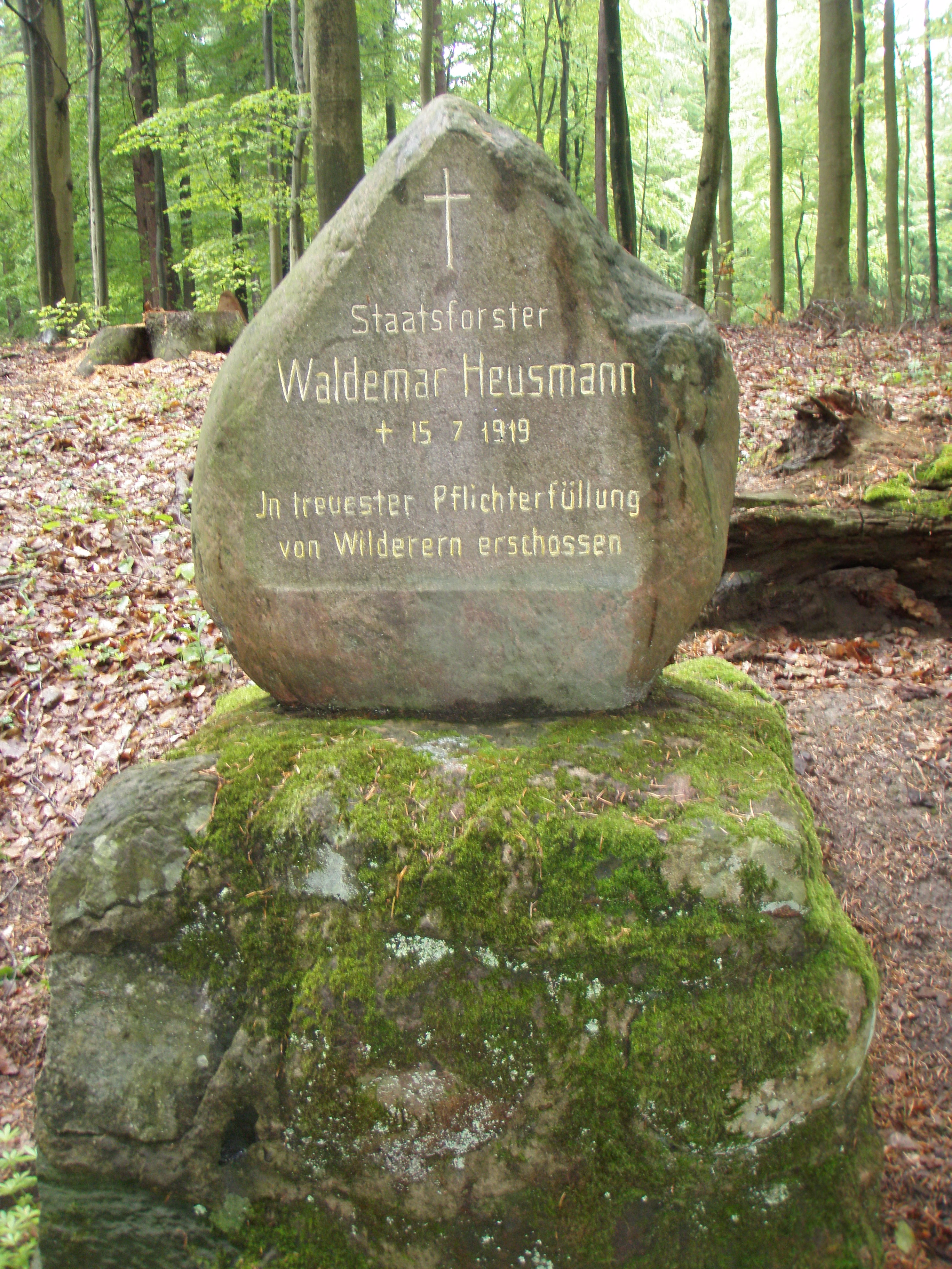 Kamień pamiątkowy w Sopocie TPK, tłumaczenie napisu: "Leśniczy państwowy Waldemar Heusmann, zm. 15 lipca 1919, zastrzelony przez kłusowników podczas wiernego pełnienia obowiązków".